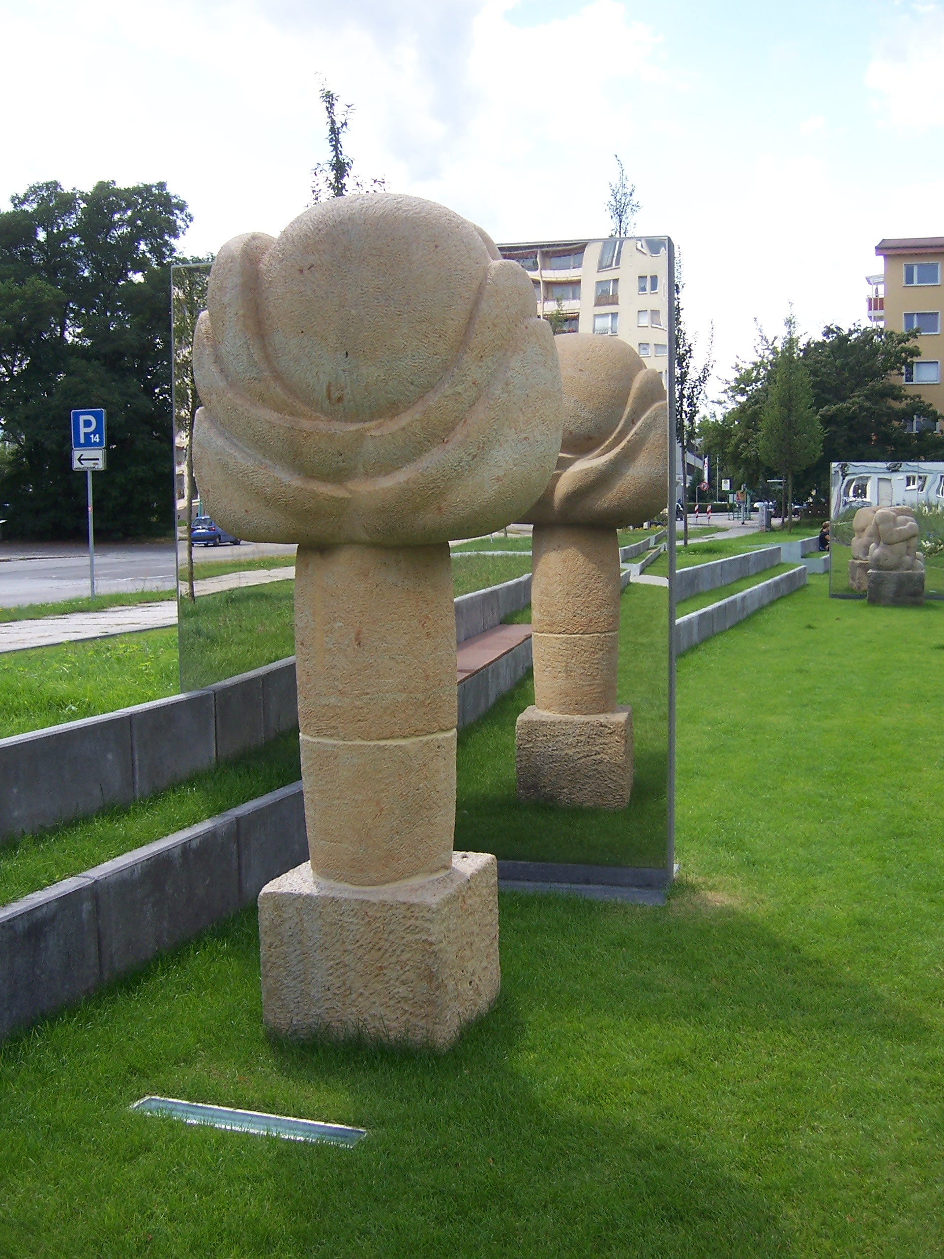 Skulptur Aufbrechende Frucht in Hoyerswerda geschaffen 1975 von Jürgen von Woyski